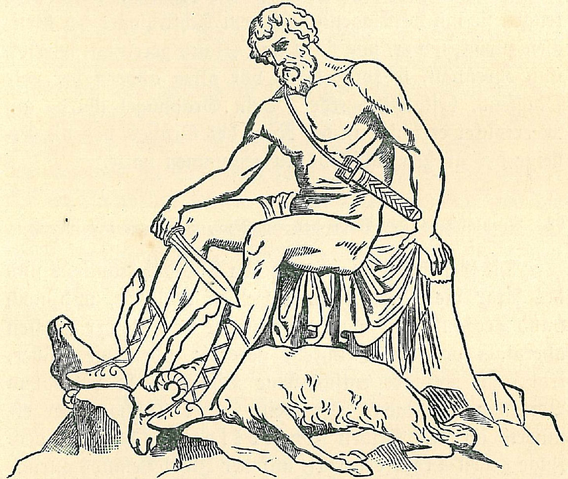 Ajax